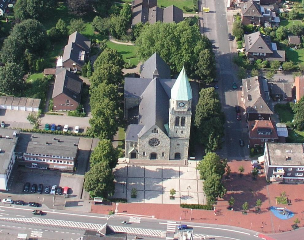 Blick auf die Kirche St. Johannes der Täufer in Kirchhellen